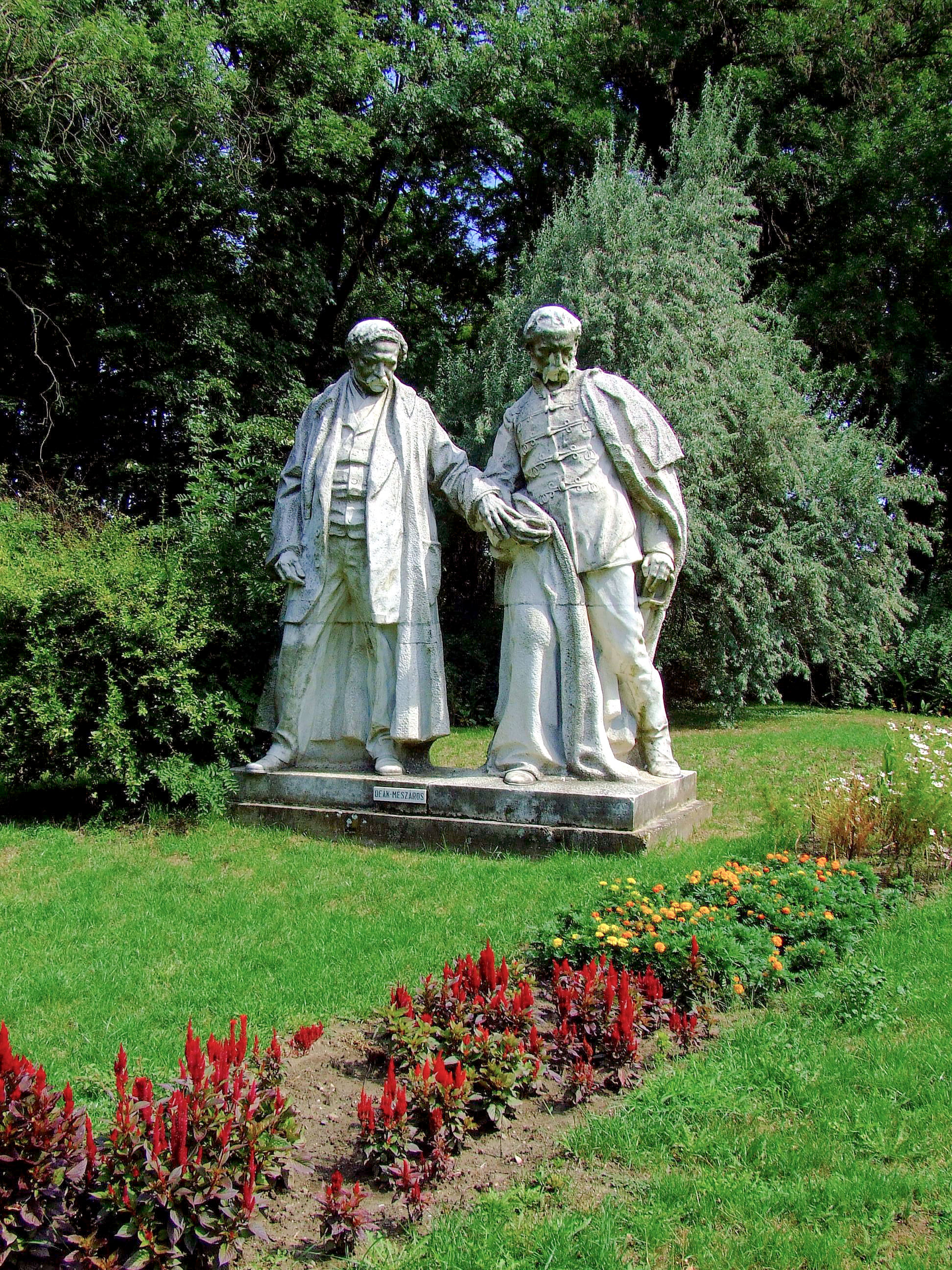 Deák Ferenc és Mészáros Lázár szobra Dombóváron. Horvay János alkotása